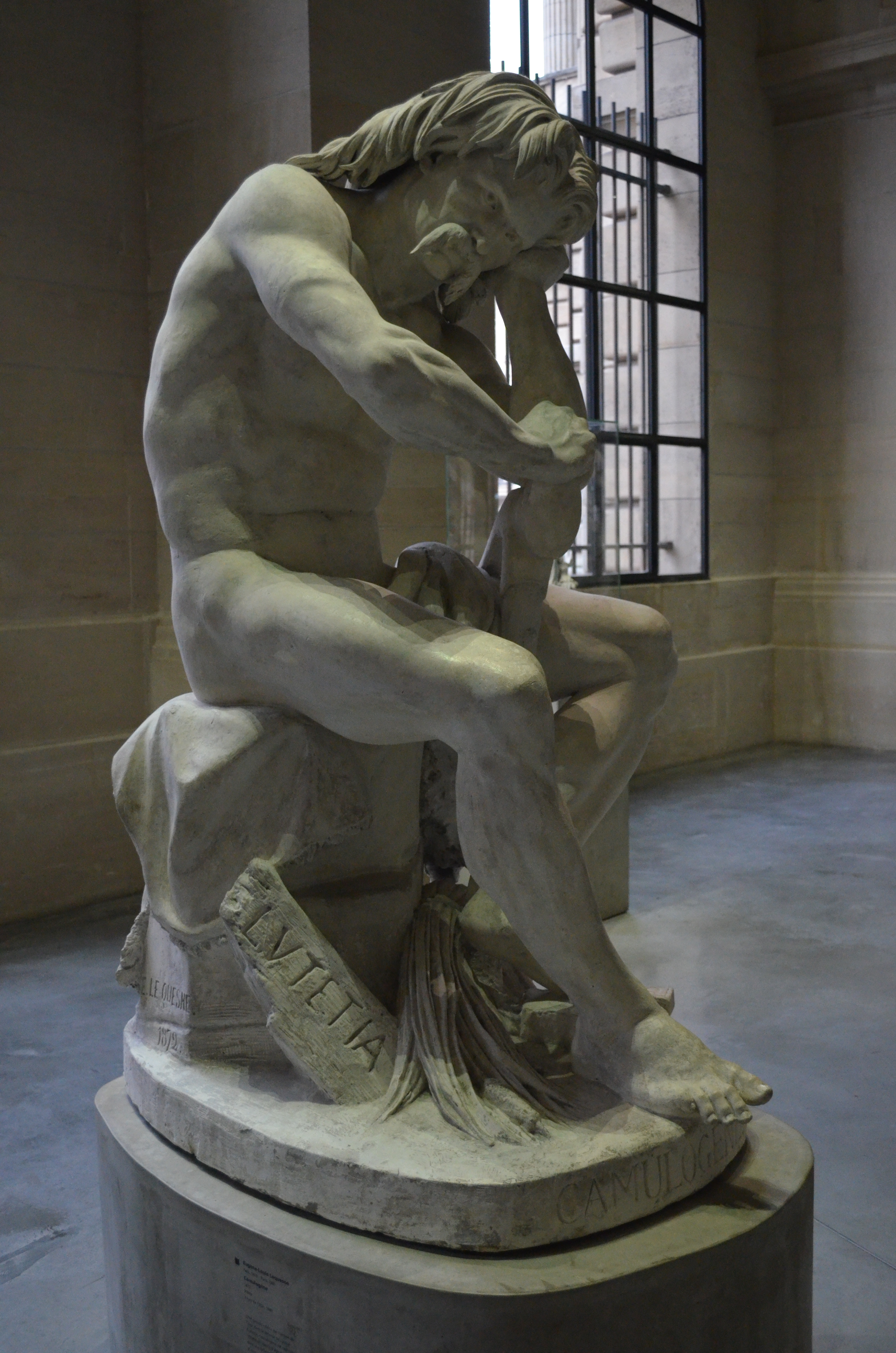 Statue de Camulogène, chef gaulois par le sculpteur Eugène-Louis Lequesne (1815-1887) au Palais des Beaux-Arts de Lille (France)